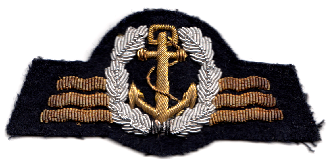 Seefahrerabzeichen der Deutschen Marine in Silber (Aufnäher)